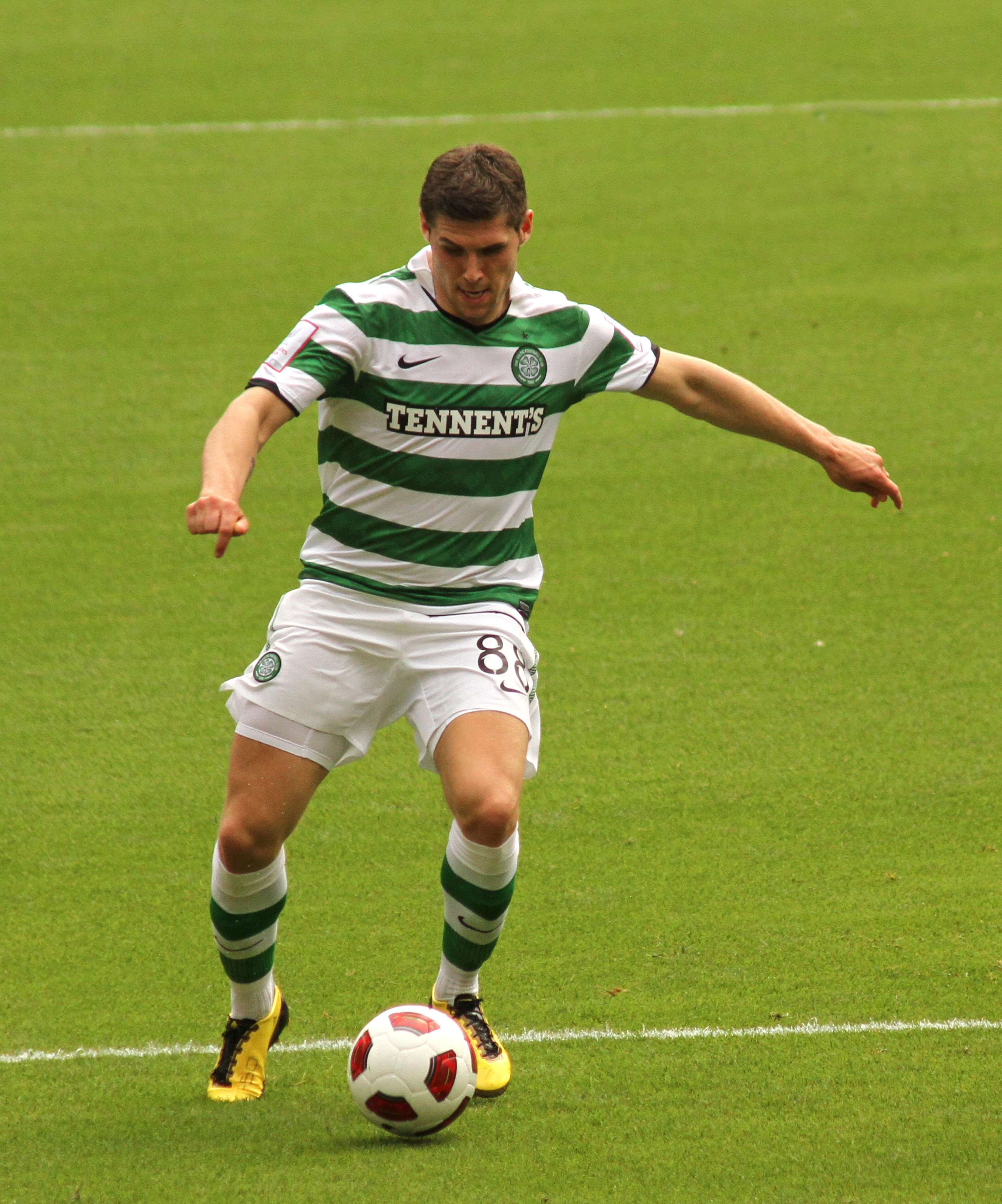 Gary Hooper & Dejan Lovren 1